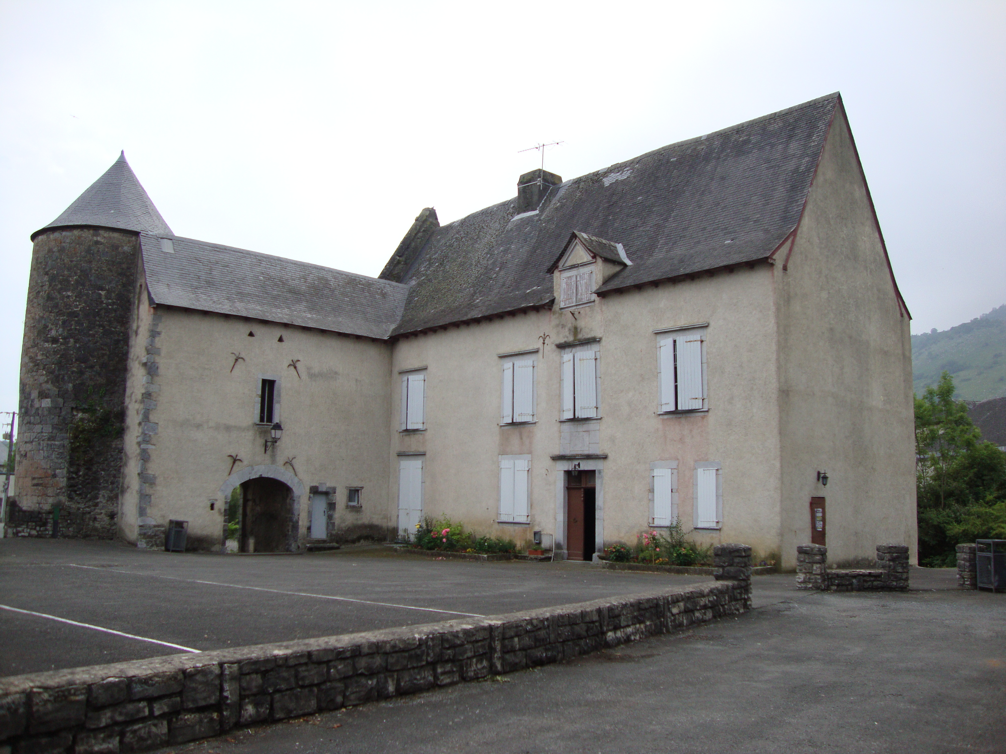 Aussurucq (Pyr-Atl, Fr) La mairie dans le château, coté cour